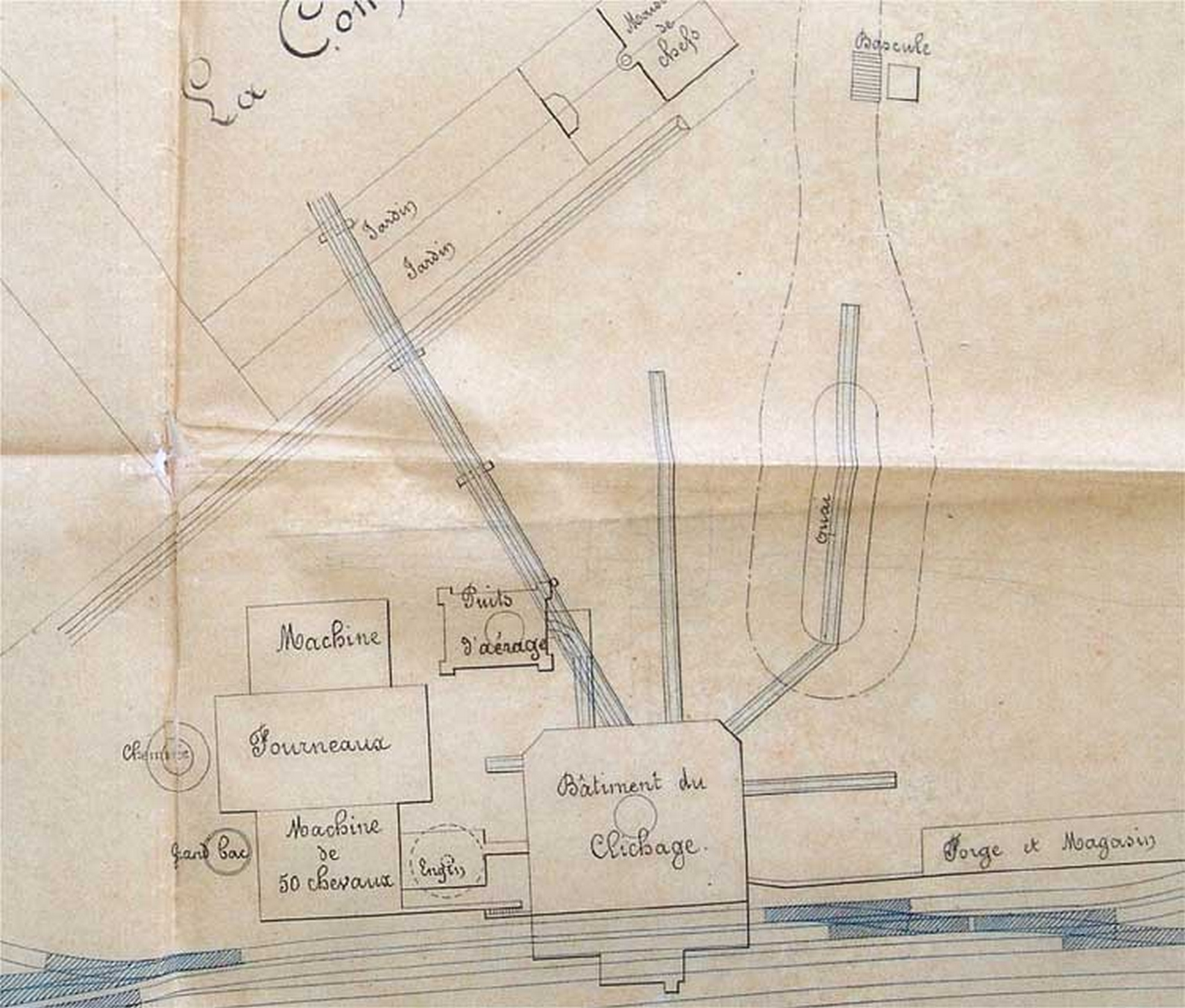 La fosse de Rœulx de la Compagnie des mines d'Anzin était un charbonnage constitué de deux puits situé à Escaudain, Nord, Nord-Pas-de-Calais, France.